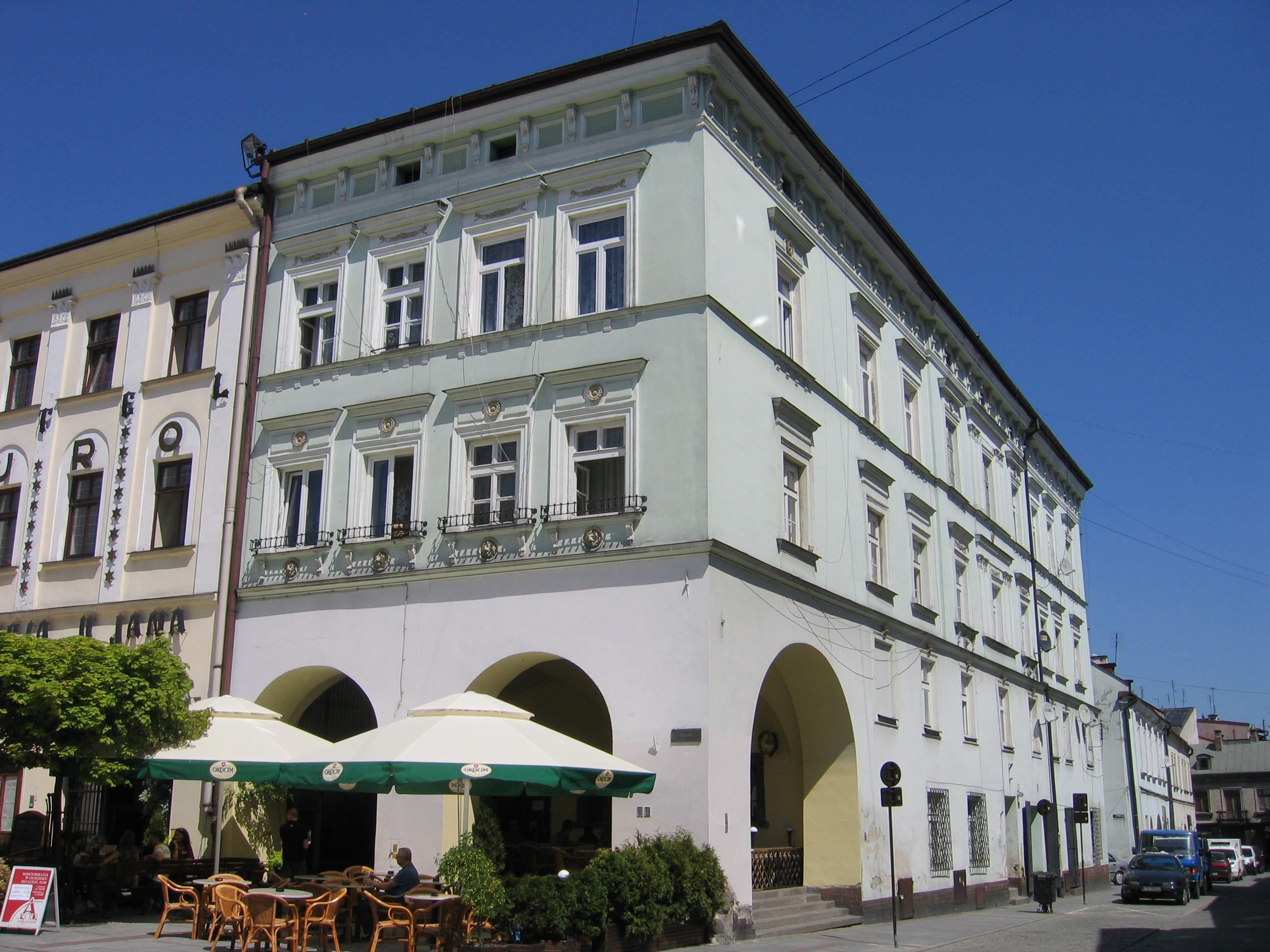 Kamienica Rynek 13 w Tarnowie 04.1998.